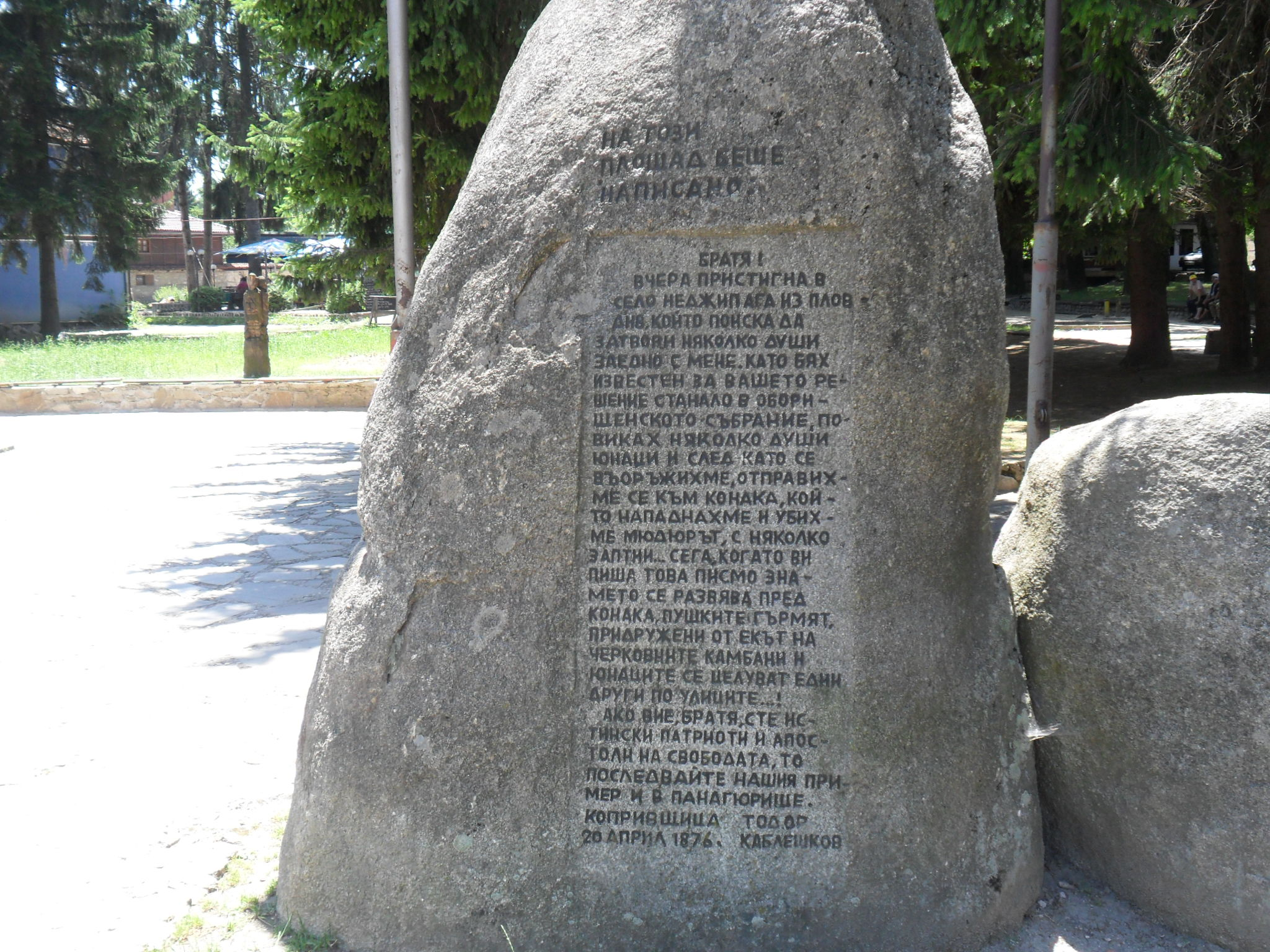 Камък с изписан текста на "Кървавото писмо" на Каблешков